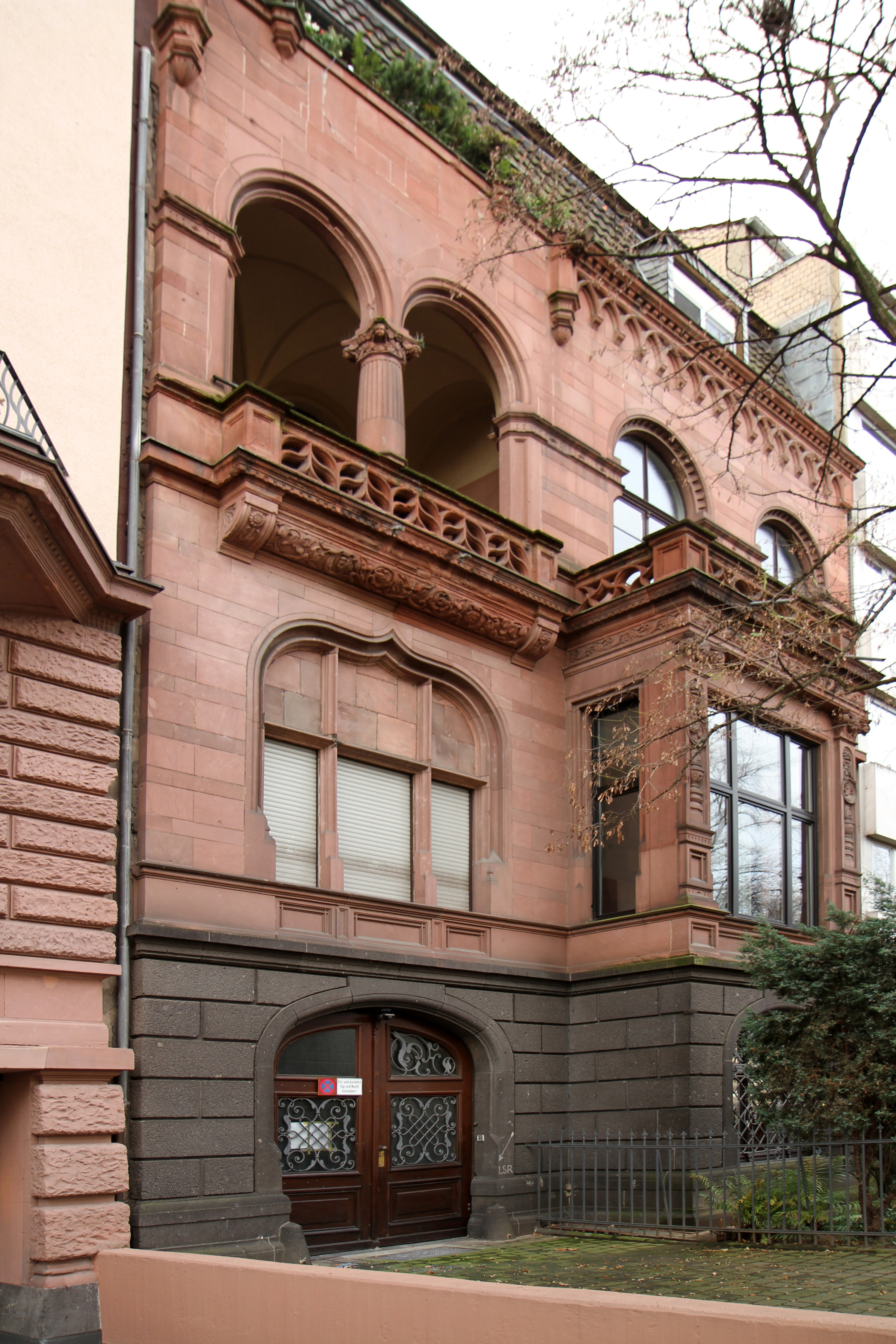 Köln Neustadt-Nord, Theodor-Heuss-Ring 20